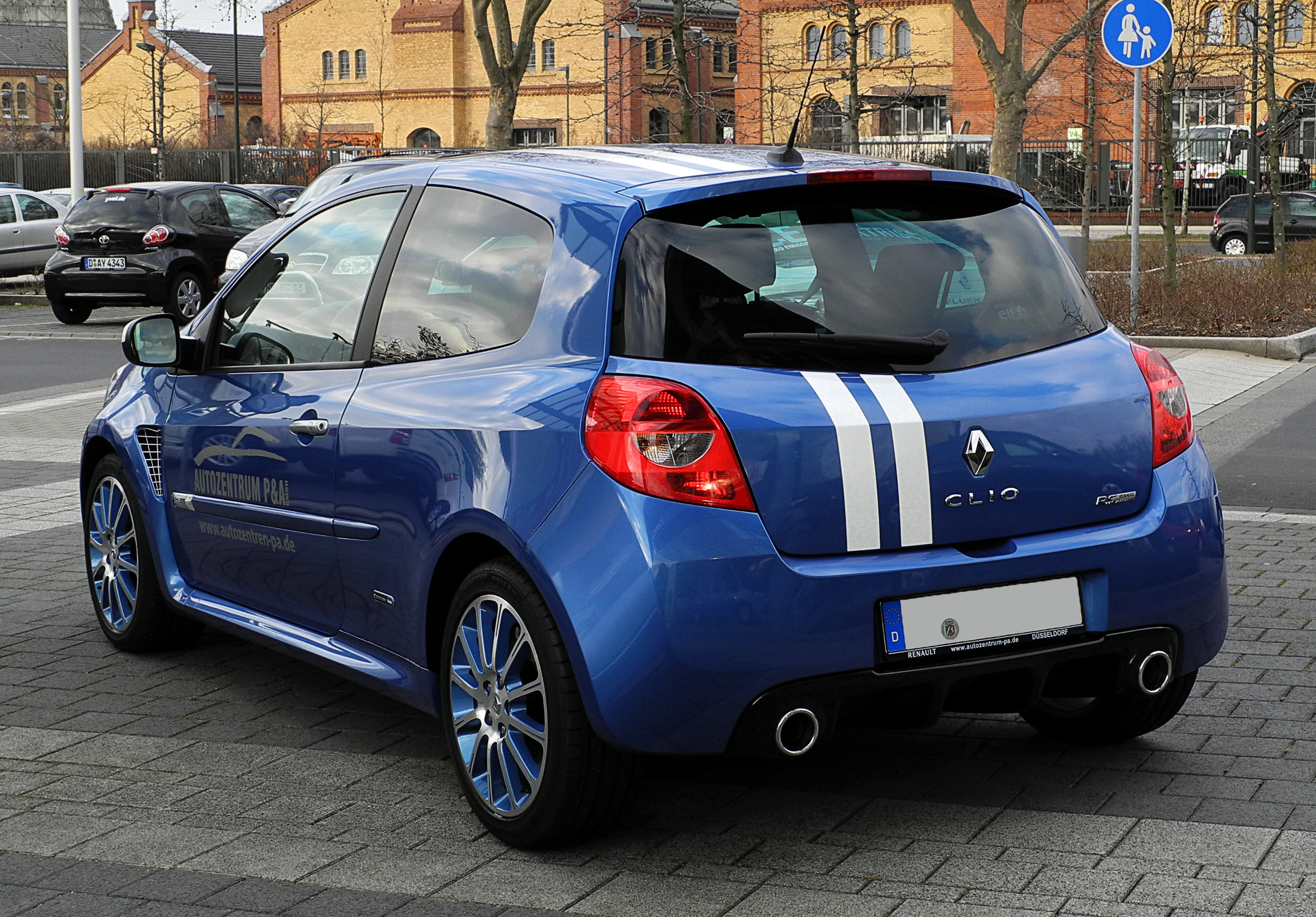 Renault Clio Gordini R.S. (III, Facelift)